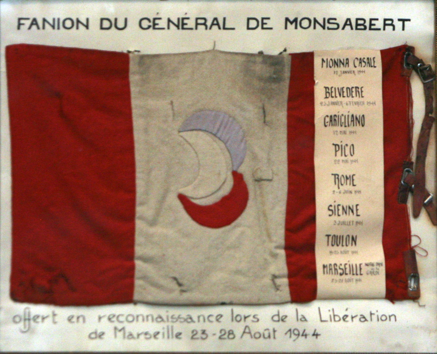 Ex voto in Notre-Dame de la Garde